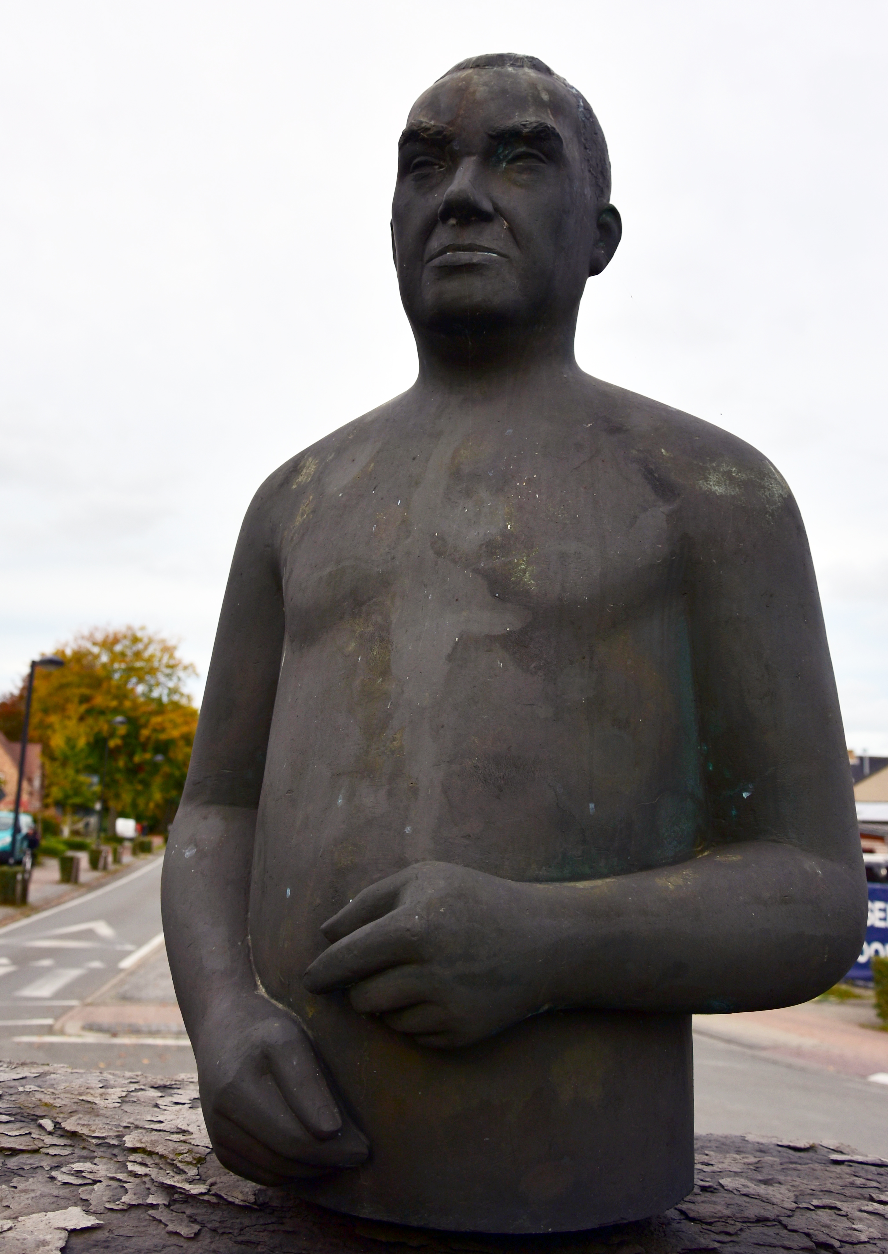 Pierre Devos (1917-1972) Constant Permeke - Jabbeke 27-10-2019 This photo of immovable heritage has been taken in the Flemish Region